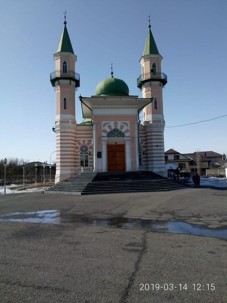 Центральный вход в мечеть